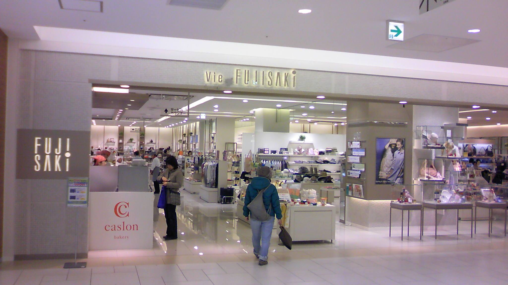 Vie FUJISAKI長町店